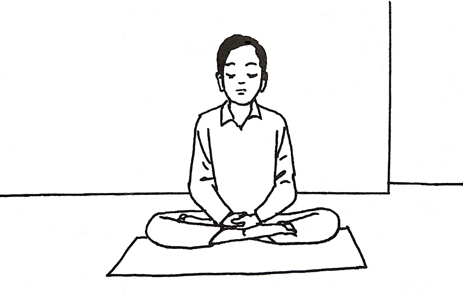 සිංහල: Meditation